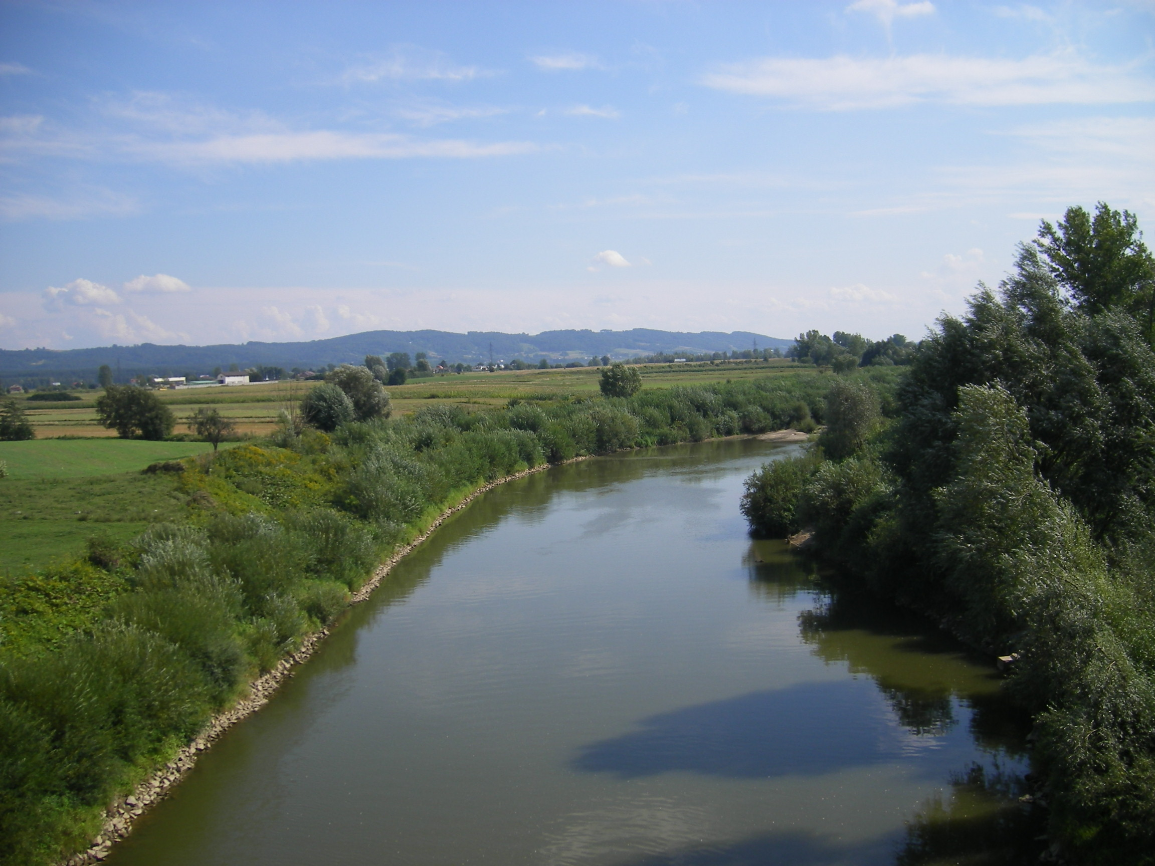 Wisłoka River at Pilzno (powiat Debica)